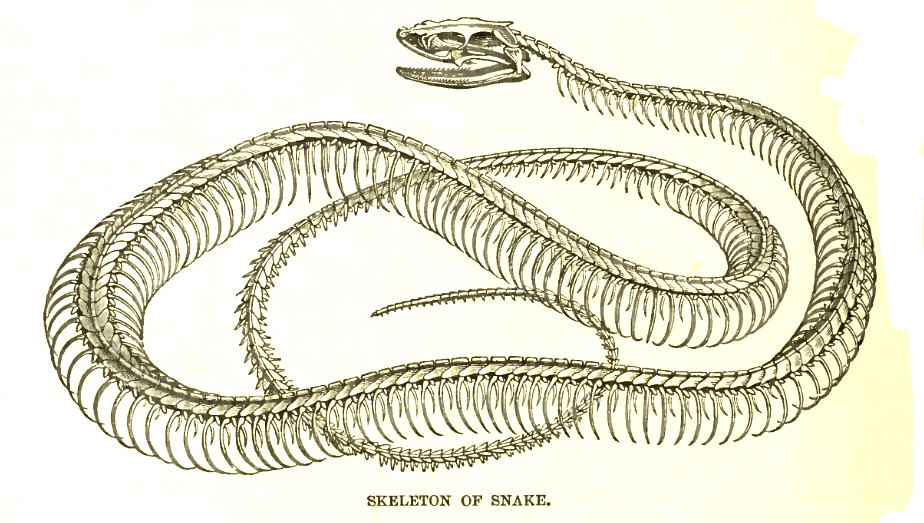 Snake Skeleton